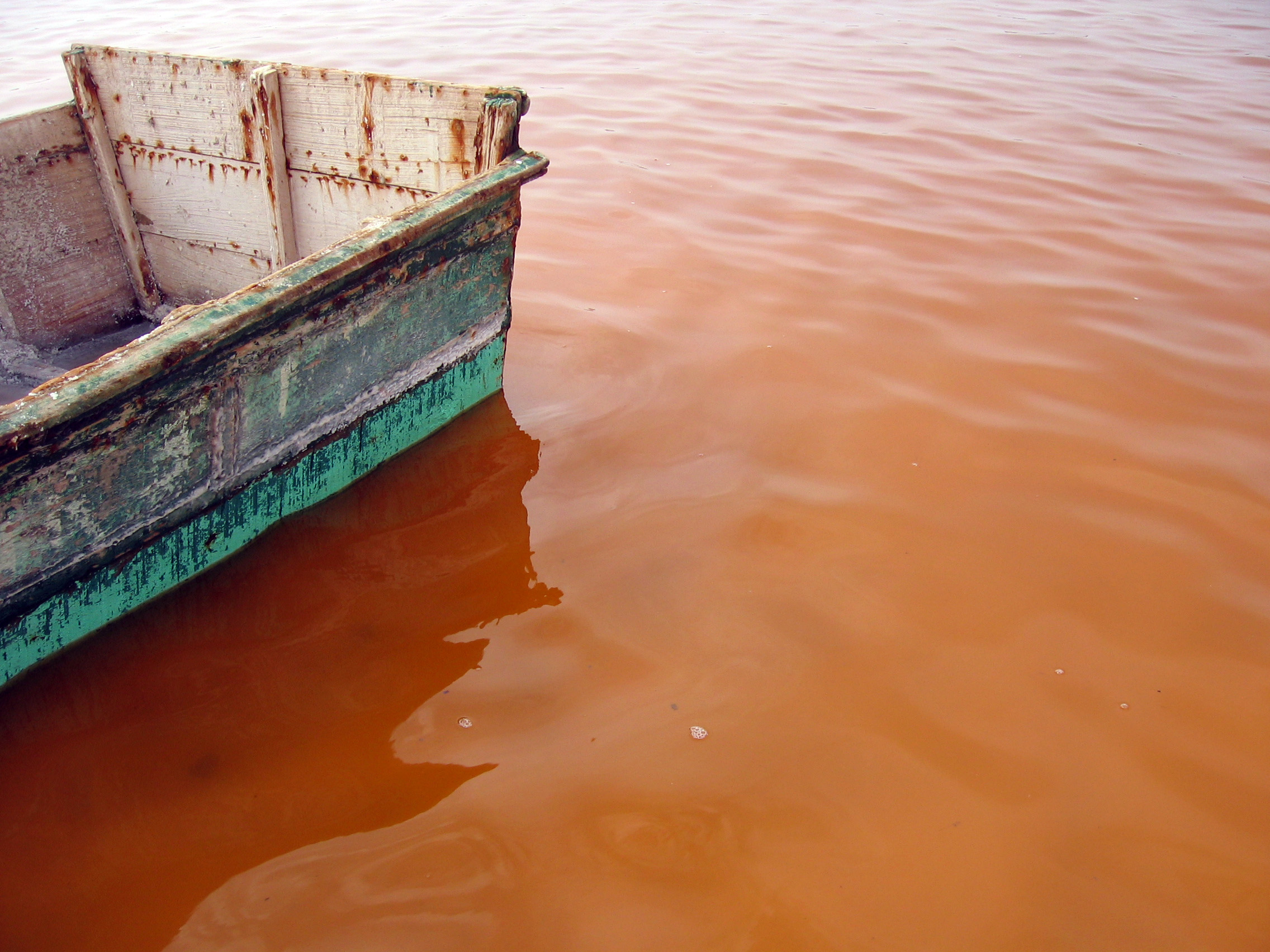 Lac Rose (Sénégal)